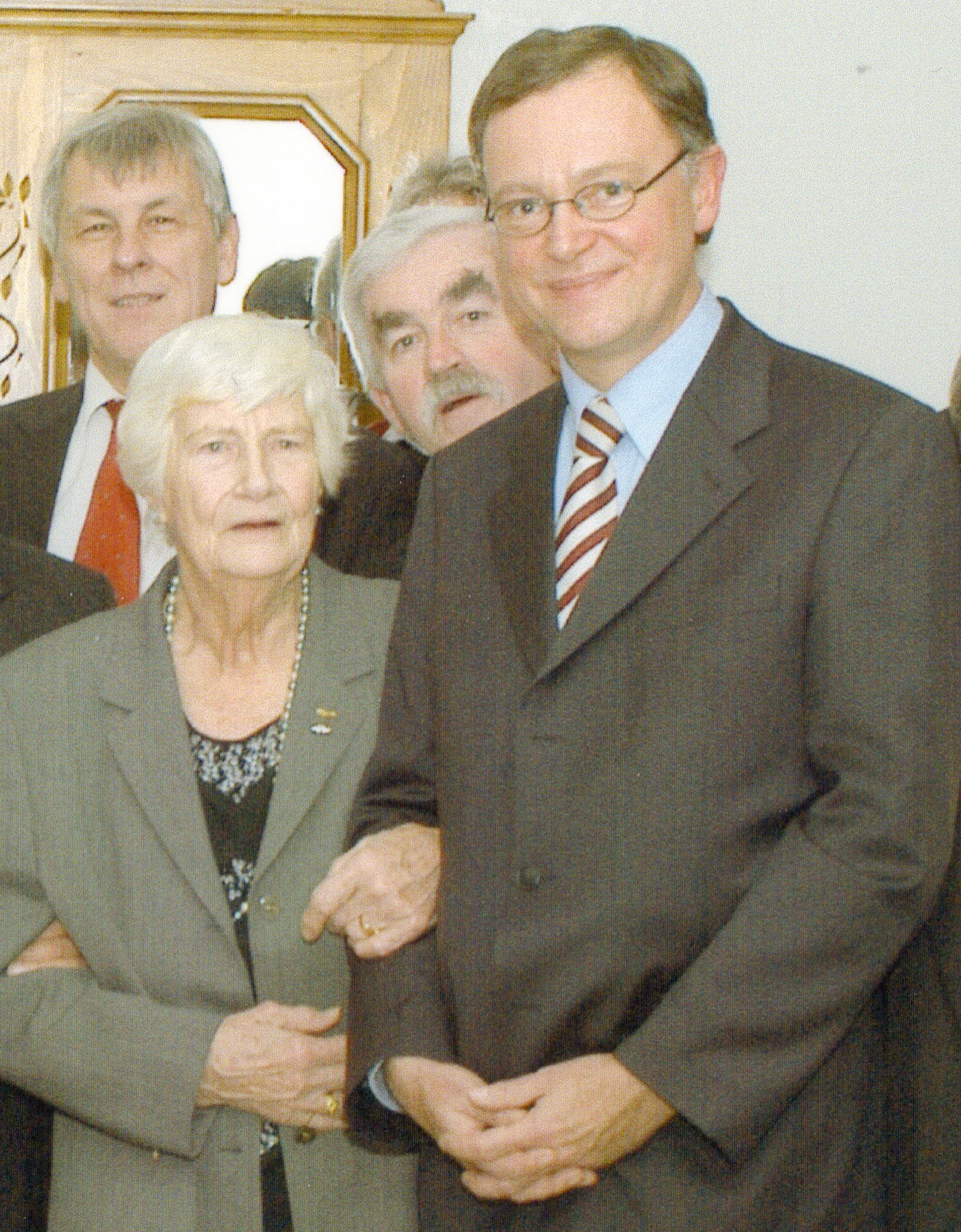 Der frühere Staatssekretär des Niedersächsischen Umweltministeriums Dietmar Schulz (zweiter von rechts) zusammen mit dem früheren Abgeordneten im Niedersächsischen Landtag Walter Meinhold (links), Erika Godschalk, früher Mitglied im Rat der Stadt Hannover und Niedersachsens Ministerpräsident Stephan Weil, damals Oberbürgermeister von Hannover, bei den Feierlichkeiten zur Ehrung des Erstgenannten für die 40jährige Mitgliedschaft in der Sozialdemokratischen Partei Deutschlands im Ortsverein Groß-Buchholz in Hannover am 4. Dezember 2005.